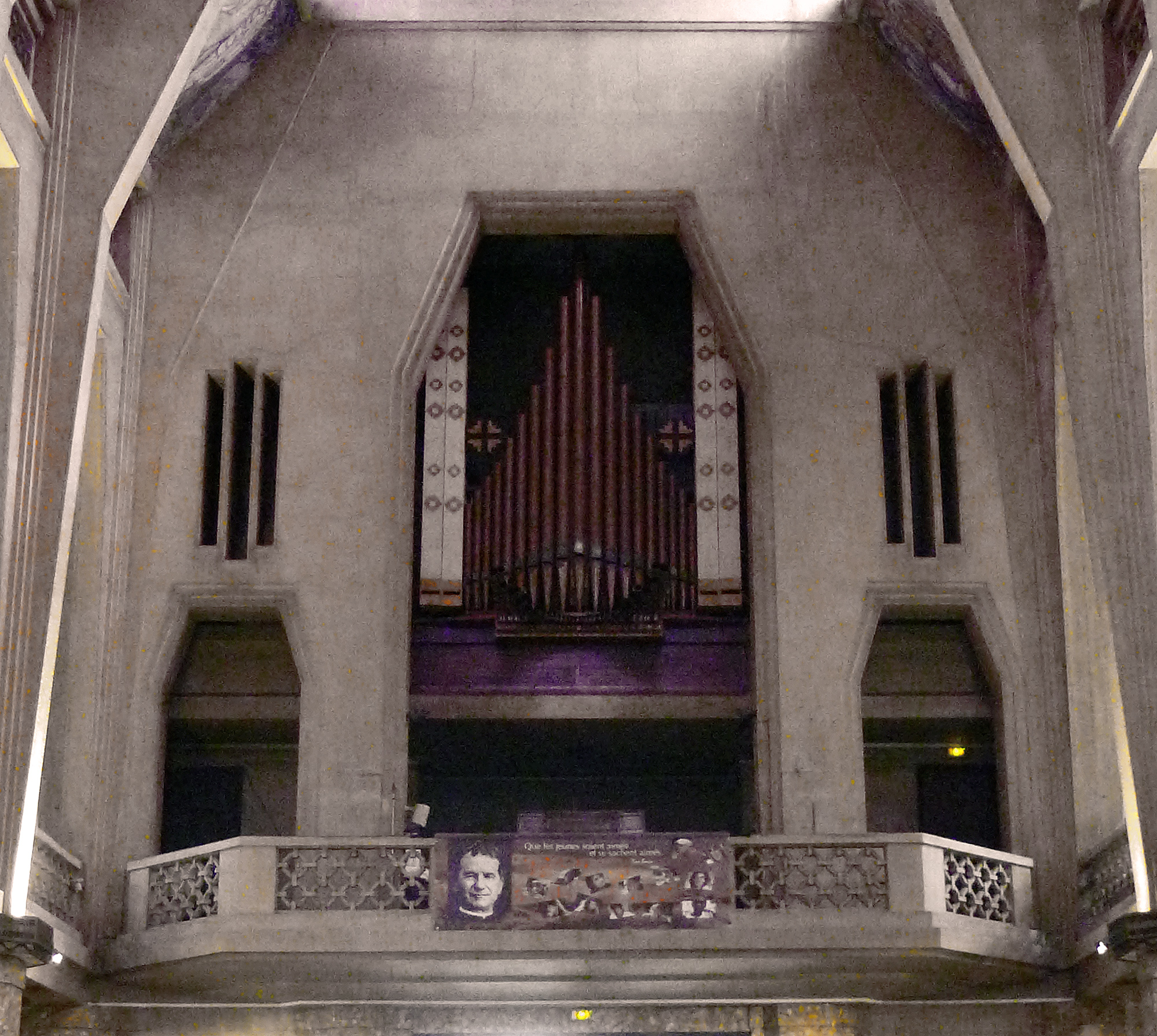 Église Saint-Jean-Bosco (Inscrite) n° 77,79 rue Alexandre-Dumas - Paris XX